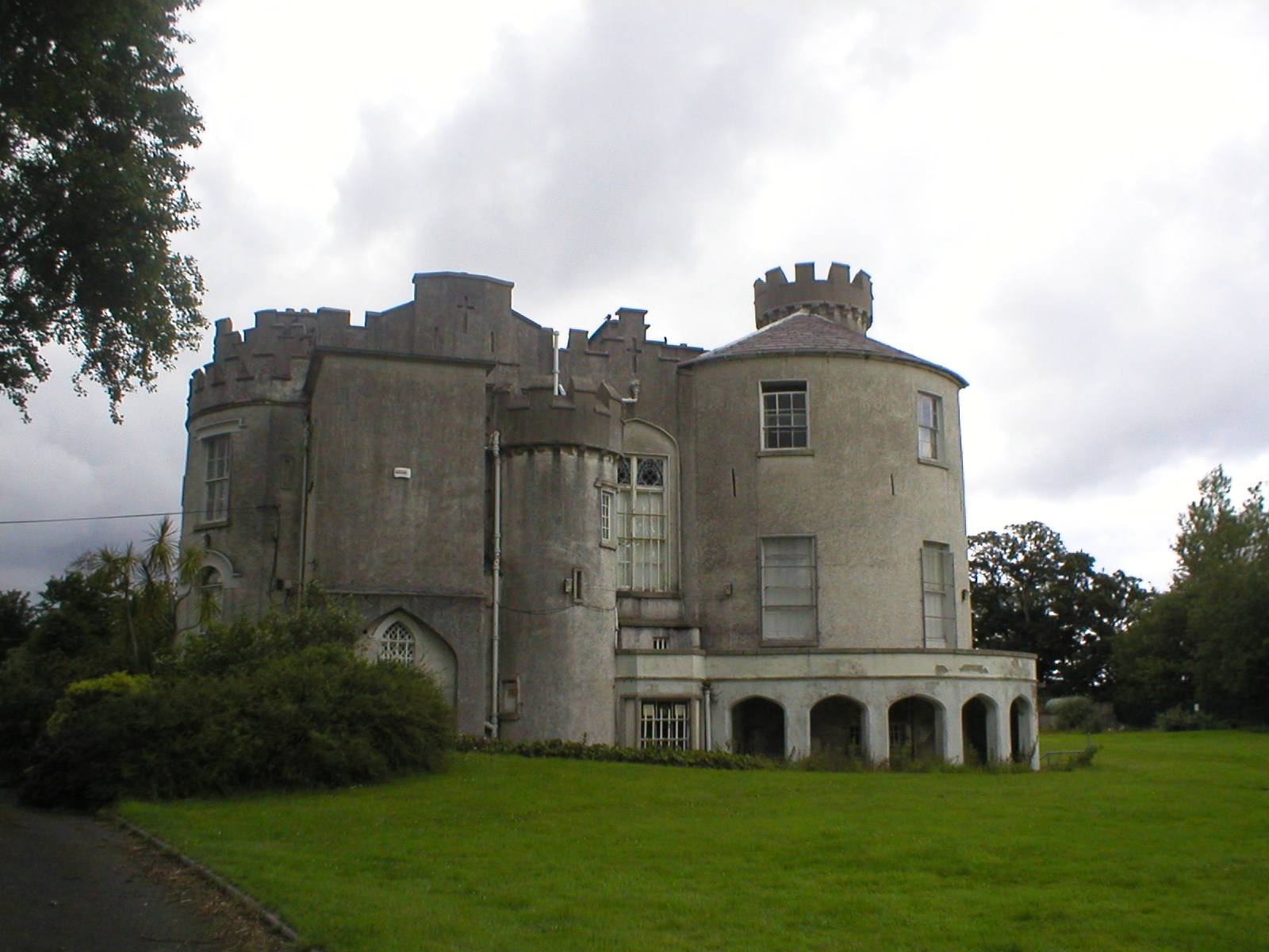 Shanganagh_Castle